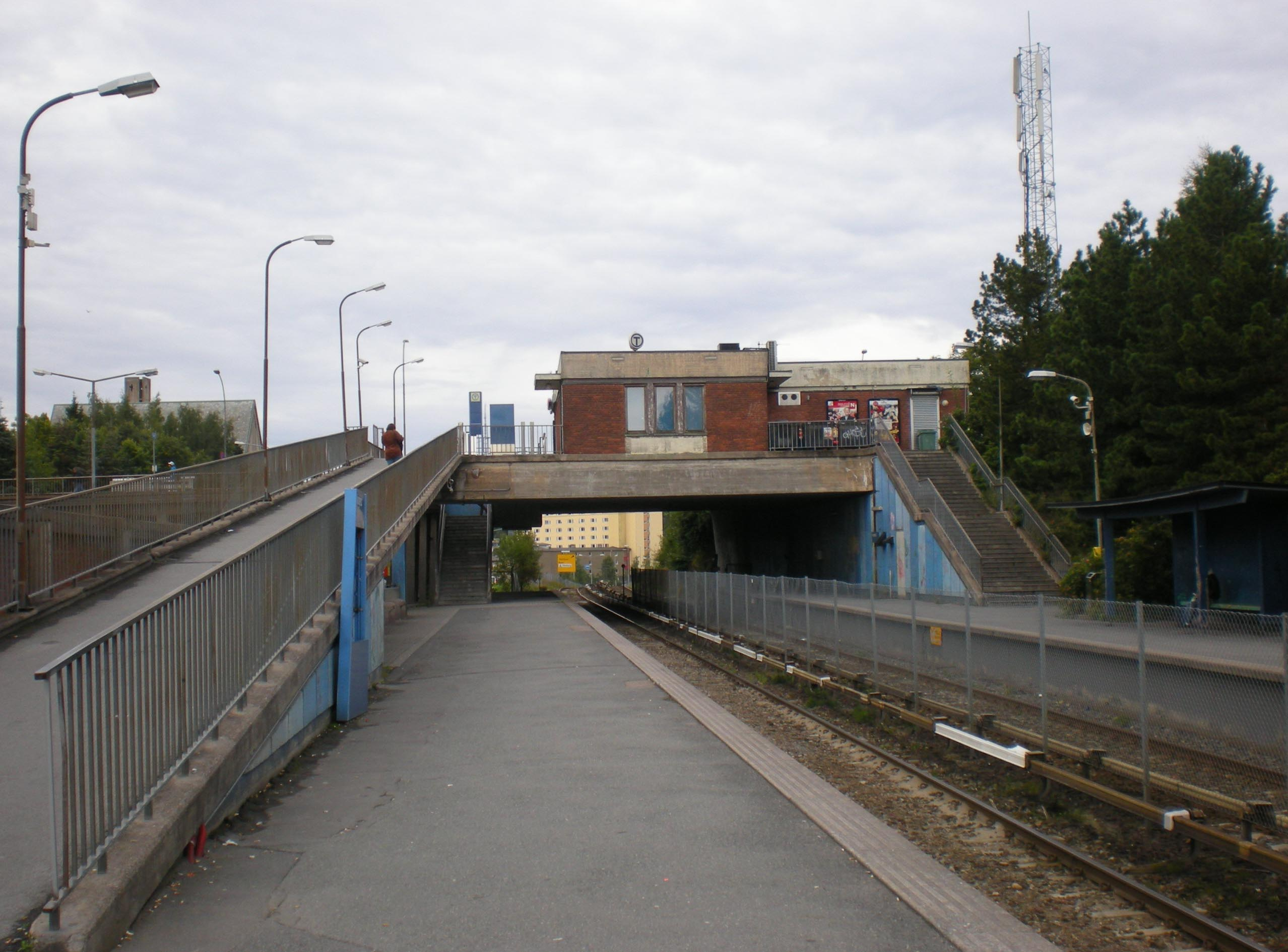 Manglerud t-banestasjon på plattformen mot Oslo sentrum.